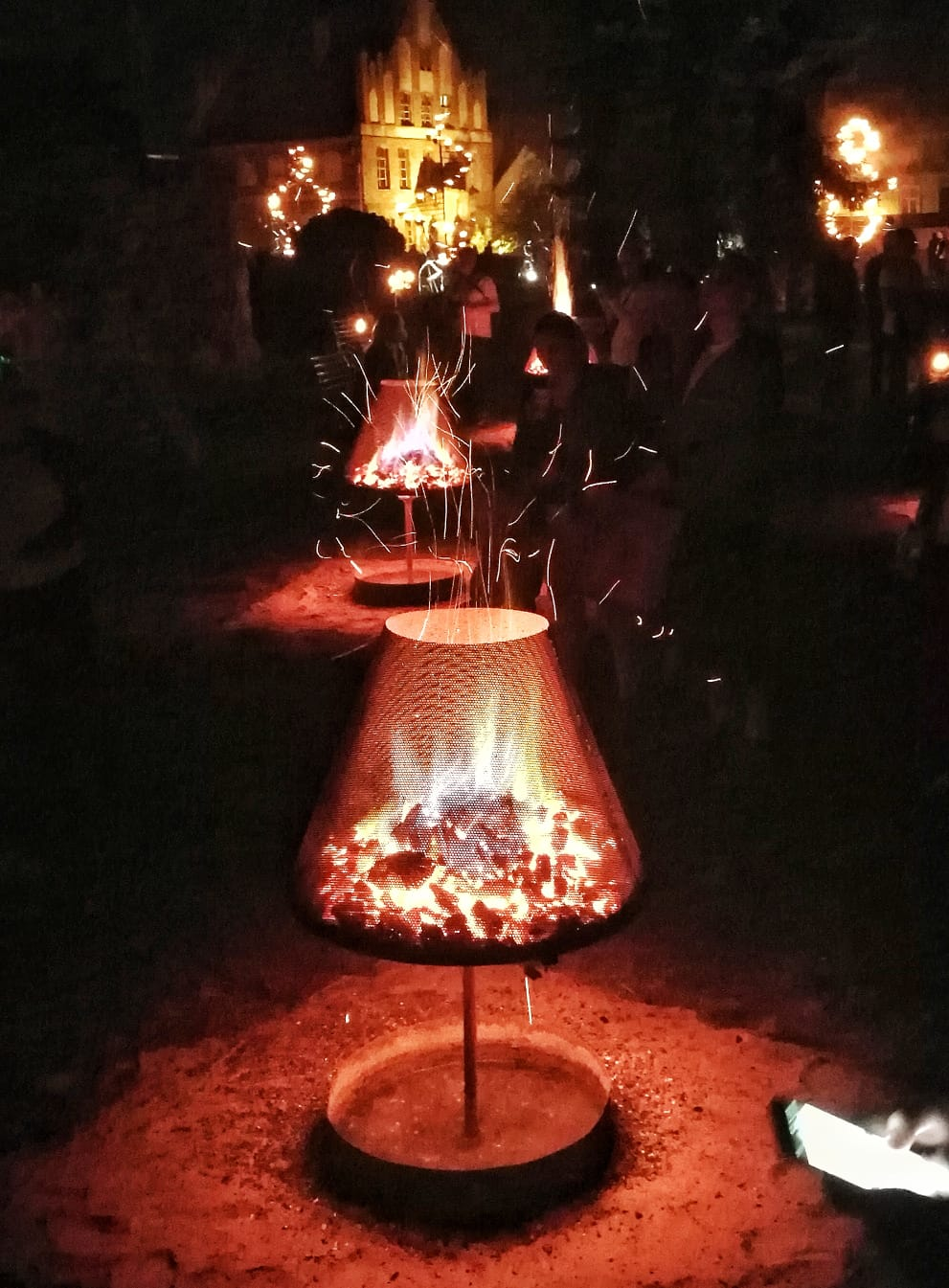 Skyway w Toruniu (Installation de feu 2018)